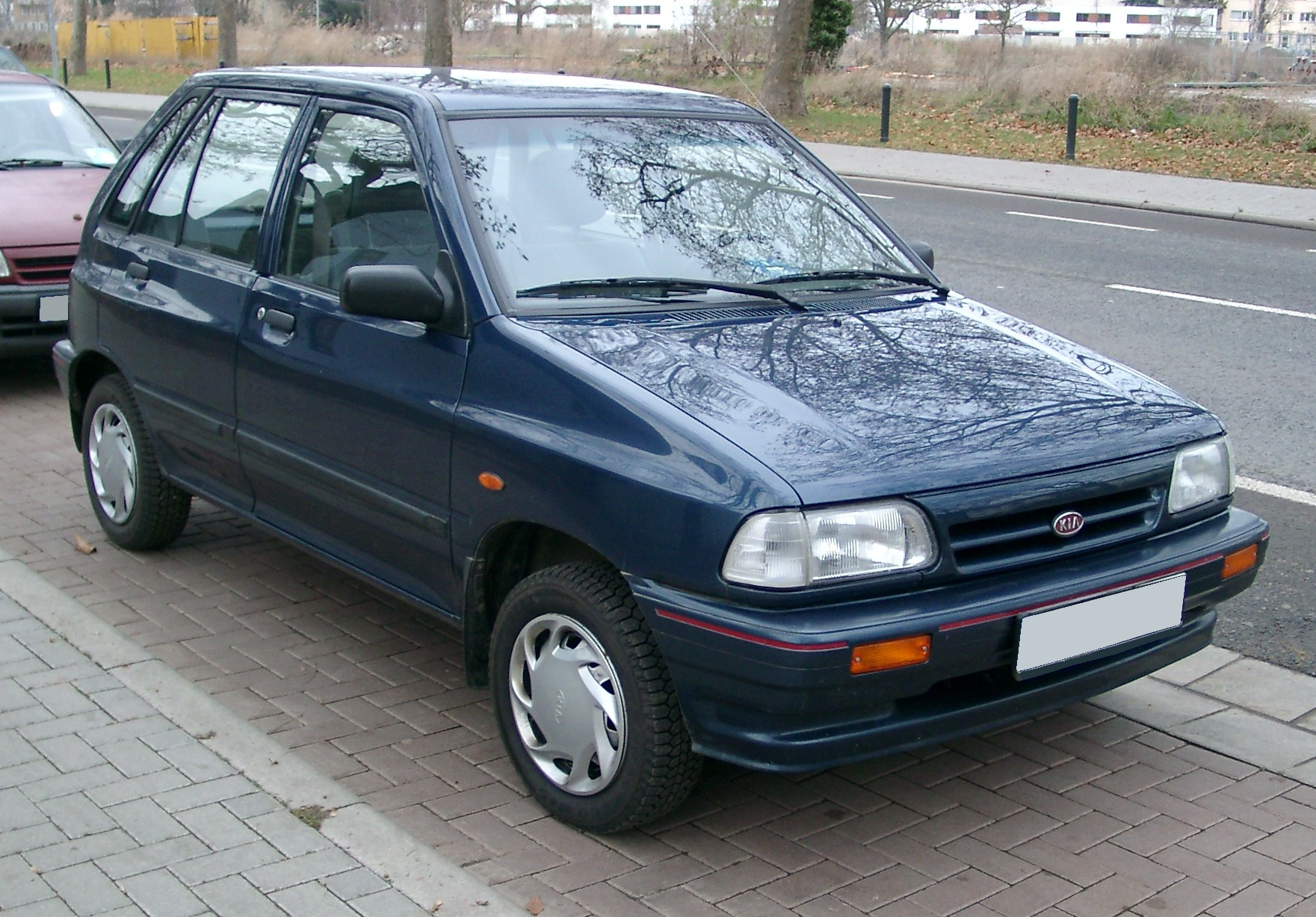 Kia Pride